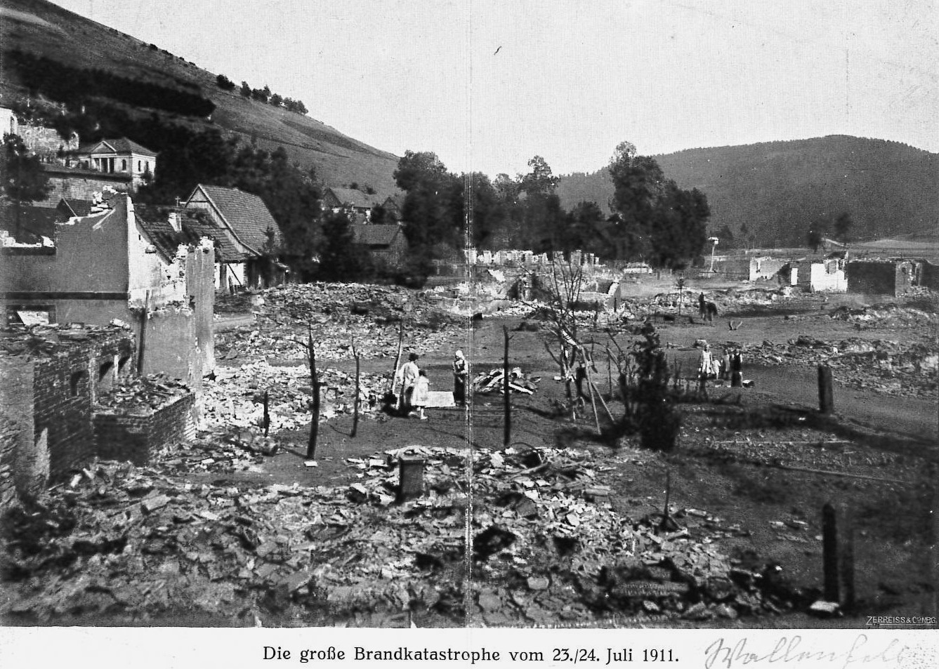 Brandkatastrophe in Wallenfels am 23./24. Juli 1911